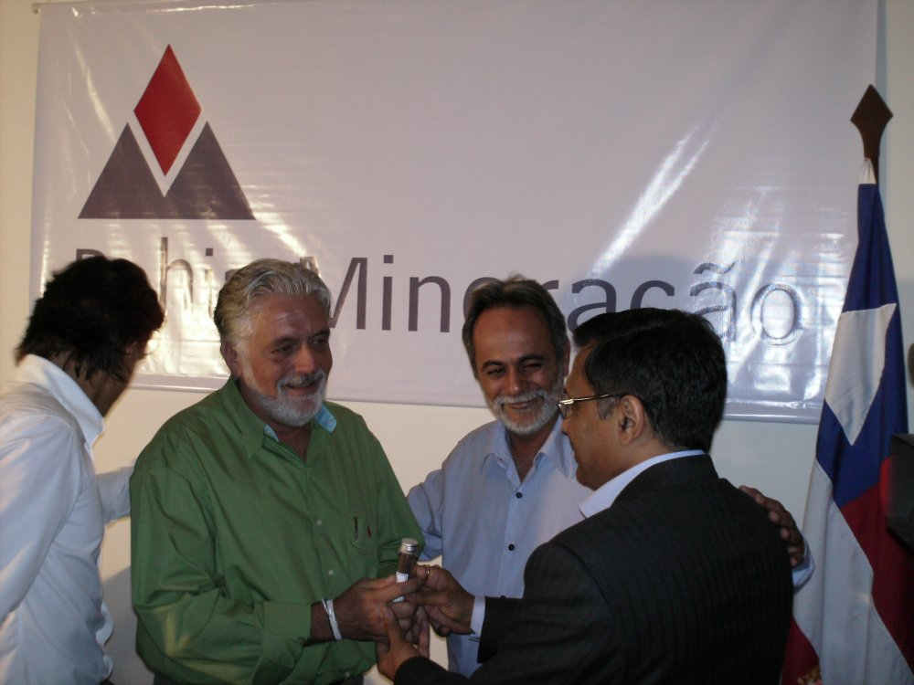 Caetité - Bahia - autoridades governamentais